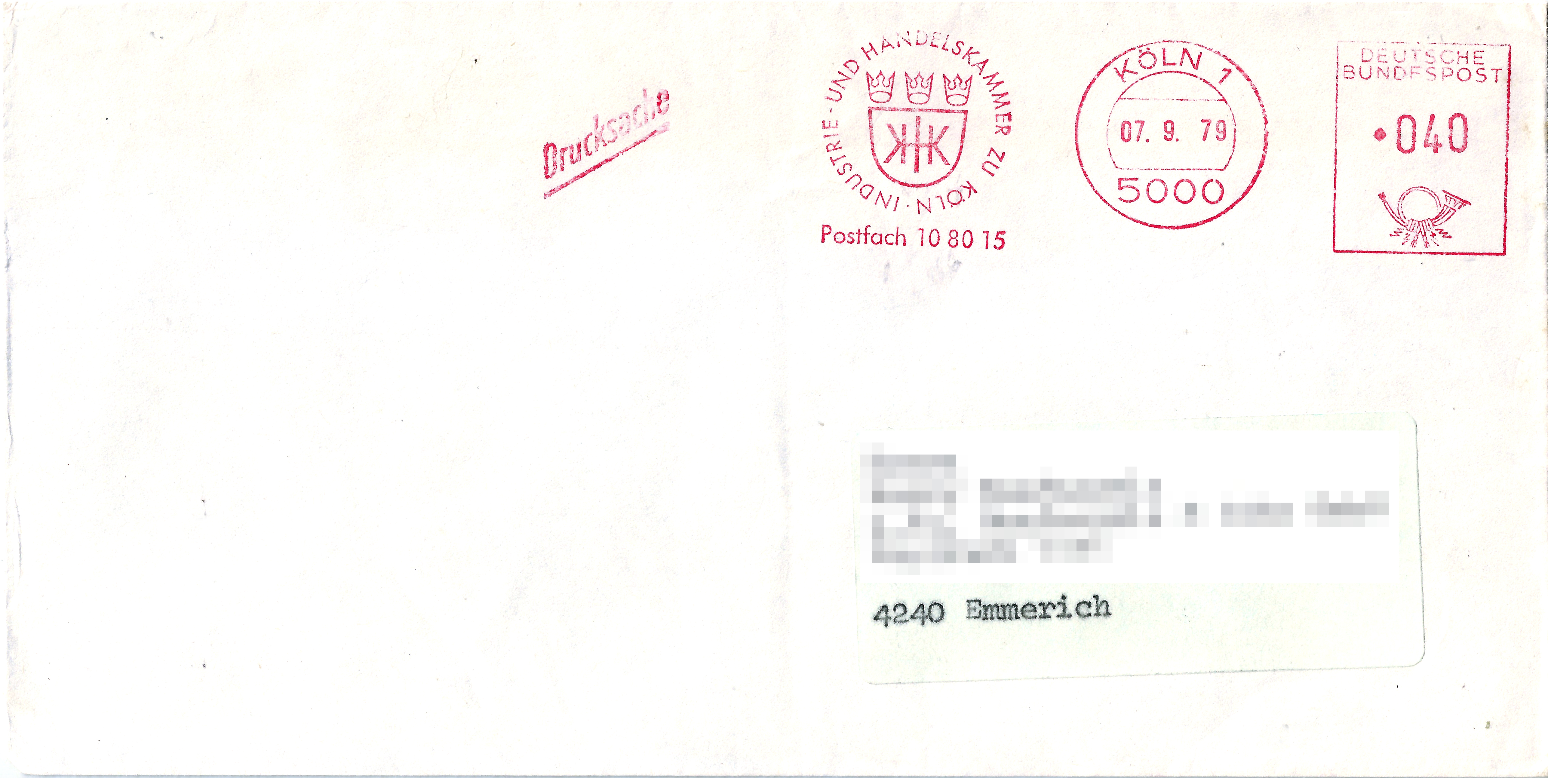 Briefsendung, Versand mit der Deutschen Bundespost als Drucksache, frankiert 0,40 DM mittels Freistempel der Industrie- und Handelskammer zu Köln